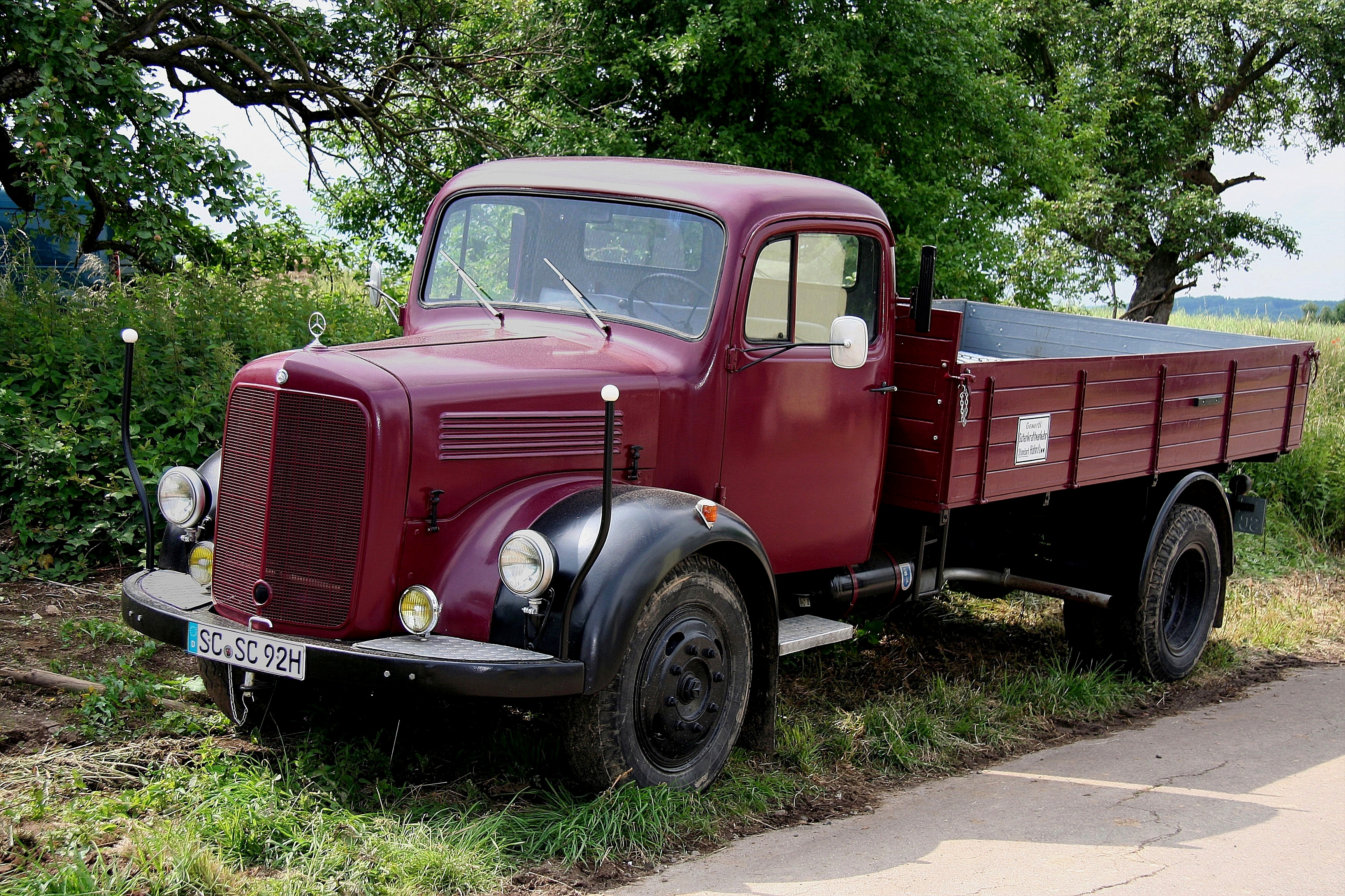 Mercedes-Benz L 3500, sogenannter 90er Mercedes, Bauzeit 1950 bis 1955. Das Foto entstand beim Traktorentreffen in Hillscheid. Technische Daten: 6-Zylinder-Vorkammer-Dieselmotor, 4,58 l Hubraum, 90 PS bei 2800/min, Höchstgeschwindigkeit über 80 km/h, Nutzlast 3,5 t, Pritsche 3600 mm oder 4200 mm lang, Sonderaufbauten wie Dreiseitenkipper von Meiller möglich. Der Lkw wurde im Werk Mannheim gebaut. Quelle